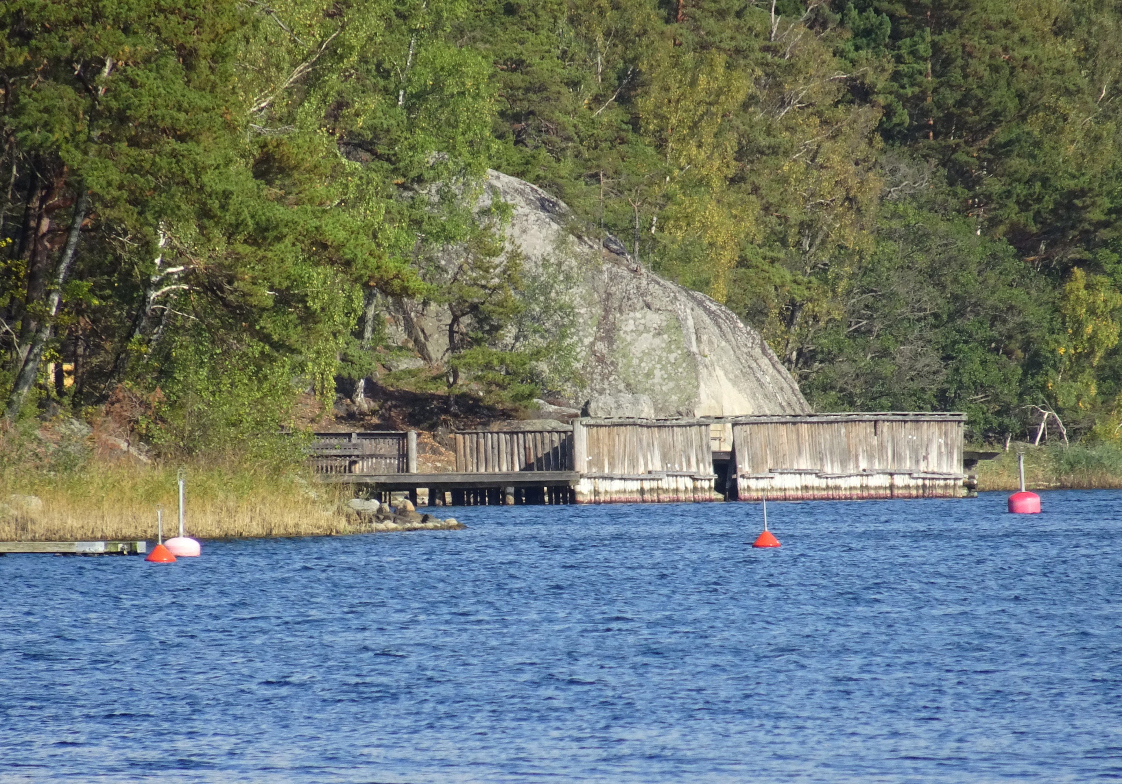 Sälstationen vid Långgarnsfjärden på Gålö